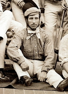 Alfred Diver